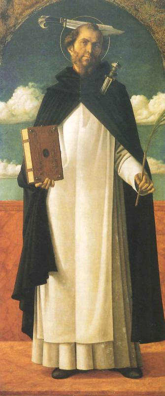 Giovanni Bellini - San Pietro martire Tempera su tavola - 1490-1500 194x84 cm Pinacoteca Bari